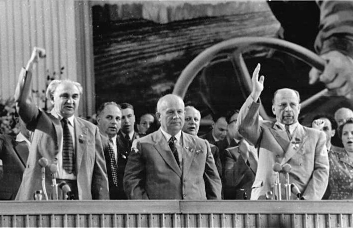 Zentralbild Ulmer 11.7.1958. V. Parteitag der sED vom 10. bis 16.7.1958 in der Werner-Seelenbinder-Halle, Berlin. 2. Tag. UBz: Begeisterte Ovationen der Delegierten nach der Aussprache des 1. Sekretärs des ZK der KpdSU, N.S. Chruschtschow (Mitte). (Links) Heinrich Rau, Mitglied des Politbüros des ZK der SED und (rechts) Walter Ulbricht, 1. Sekrtär des ZK der SED.